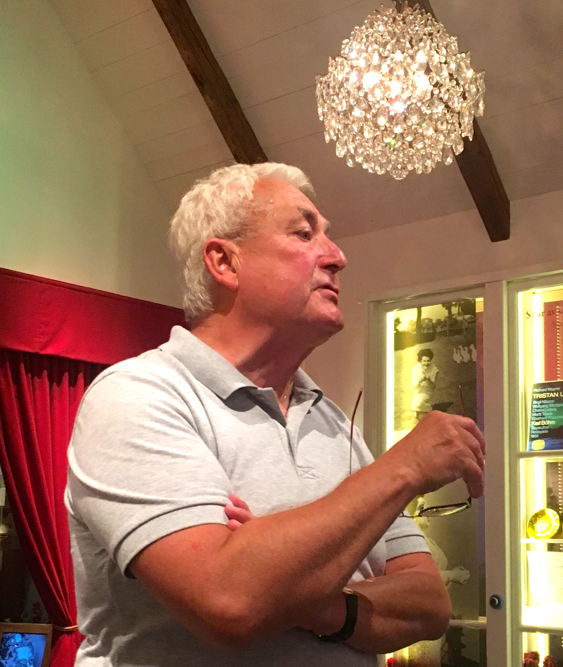 Bengt Hall, född 16 juni 1950 i Osby, är en svensk musiker, kördirigent och kultur- och operachef. Han har varit chef för en rad svenska kulturinstitutioner, såsom Malmö Symfoniorkester, Rikskonserter, Kungliga Operan och Malmö Opera. Fotot är taget i samband med föredrag på Birgit Nilsson Museum i juli 2018